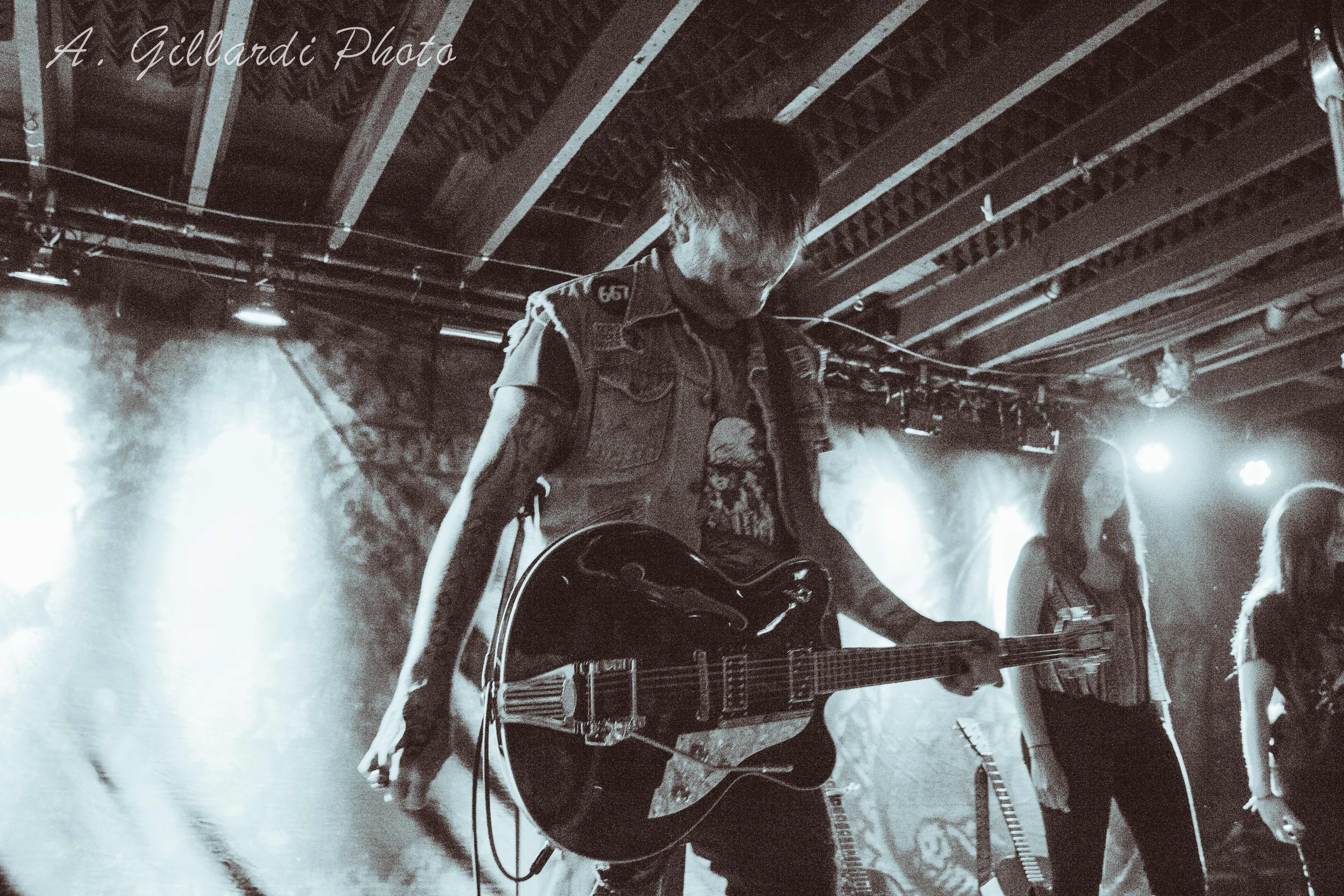 Butch_Walker-3988